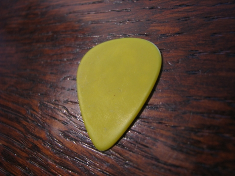 Trzalica srednje debeline.